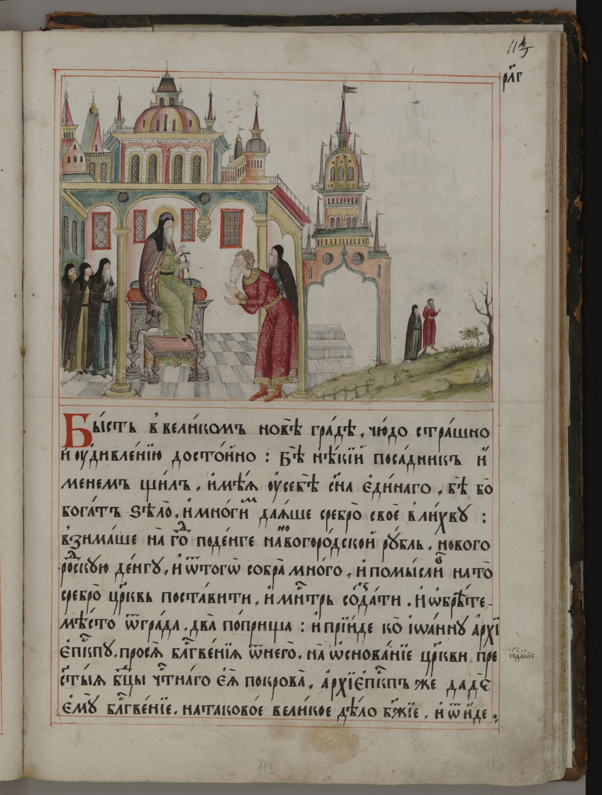 Синодик: Лицевая рукопись. Конец XVII - начало XVIII в.